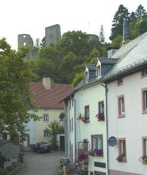 Schönecken